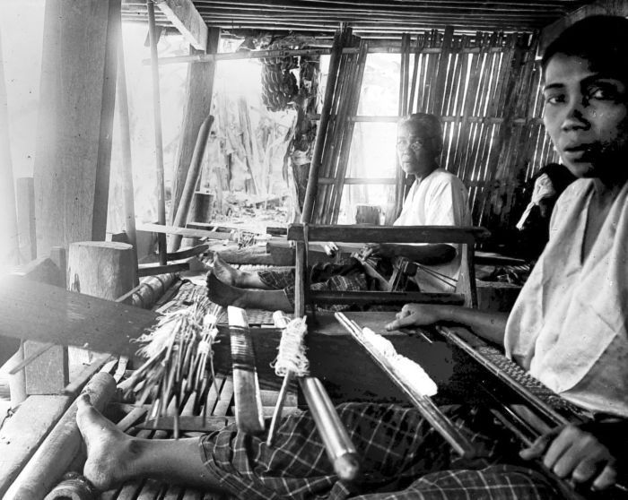 Repronegatief. Vrouwen aan het weeftoestel te Madjene, Celebes